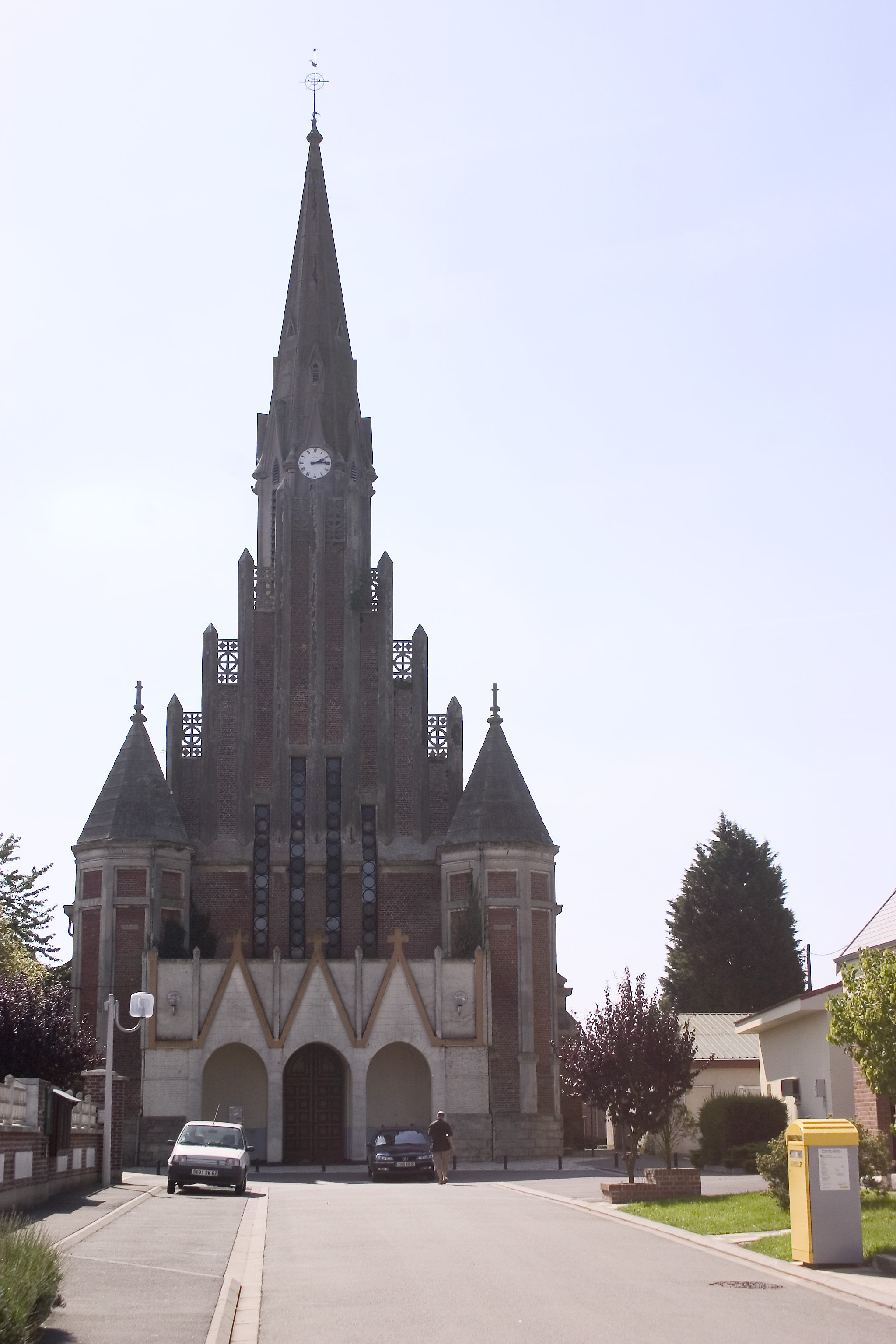 vis-en-artois-eglise